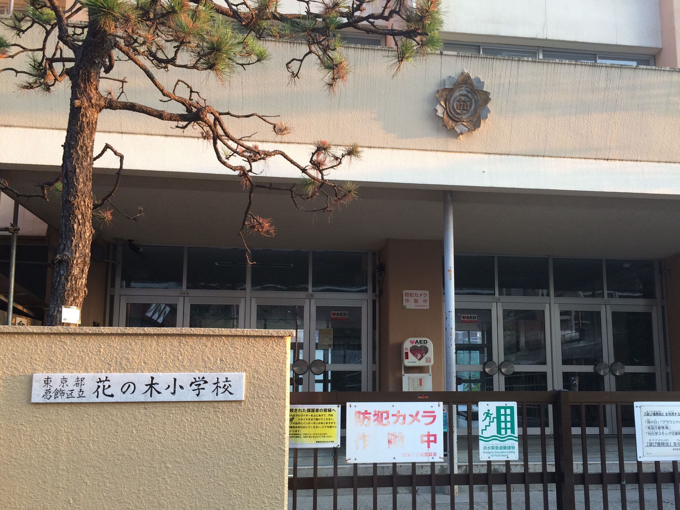 葛飾区立花の木小学校の正門